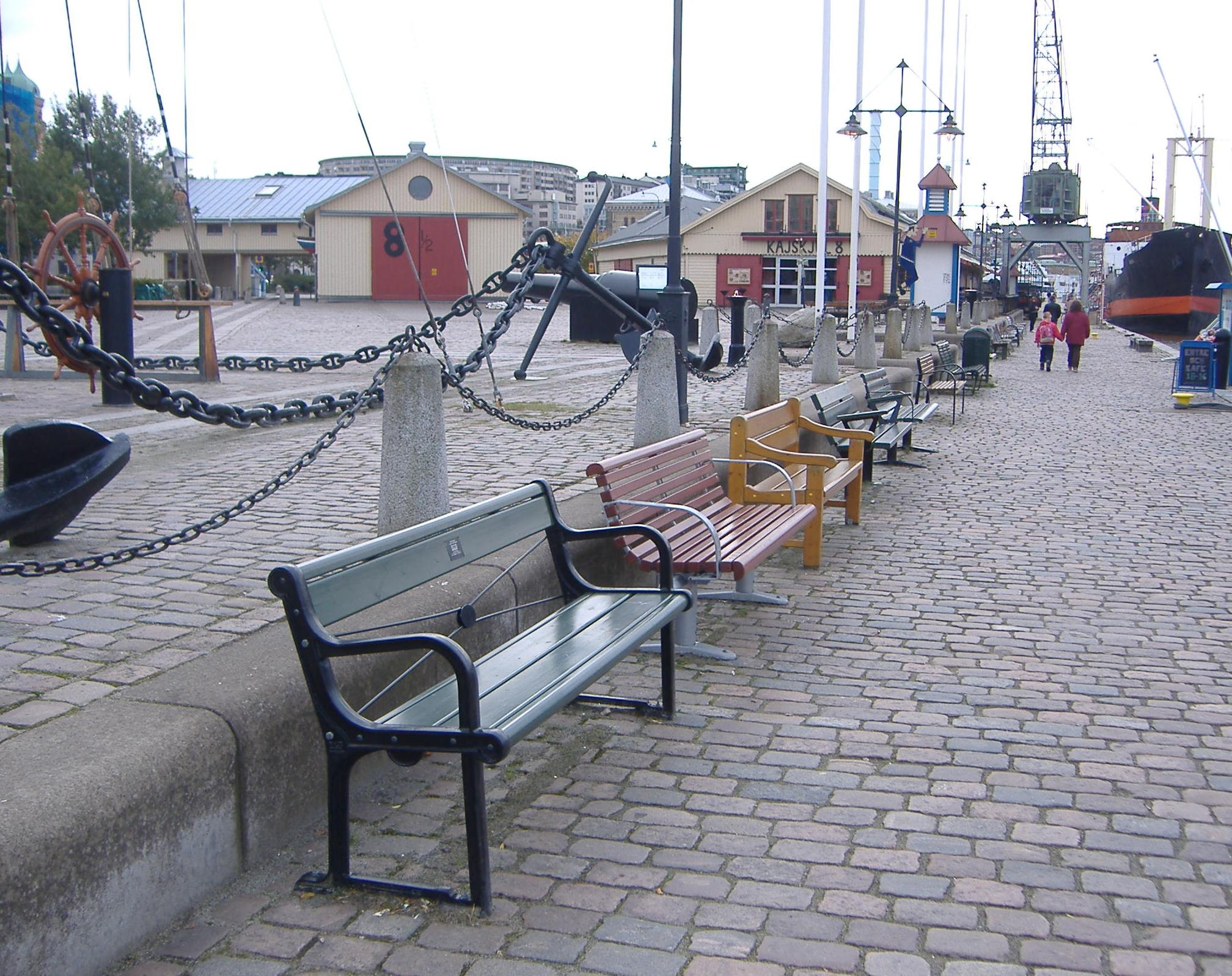 ספסלים שונים בנמל של גוטבורג